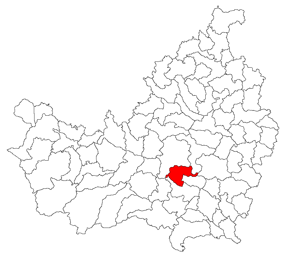 Comuna Feleacu, judeţul Cluj